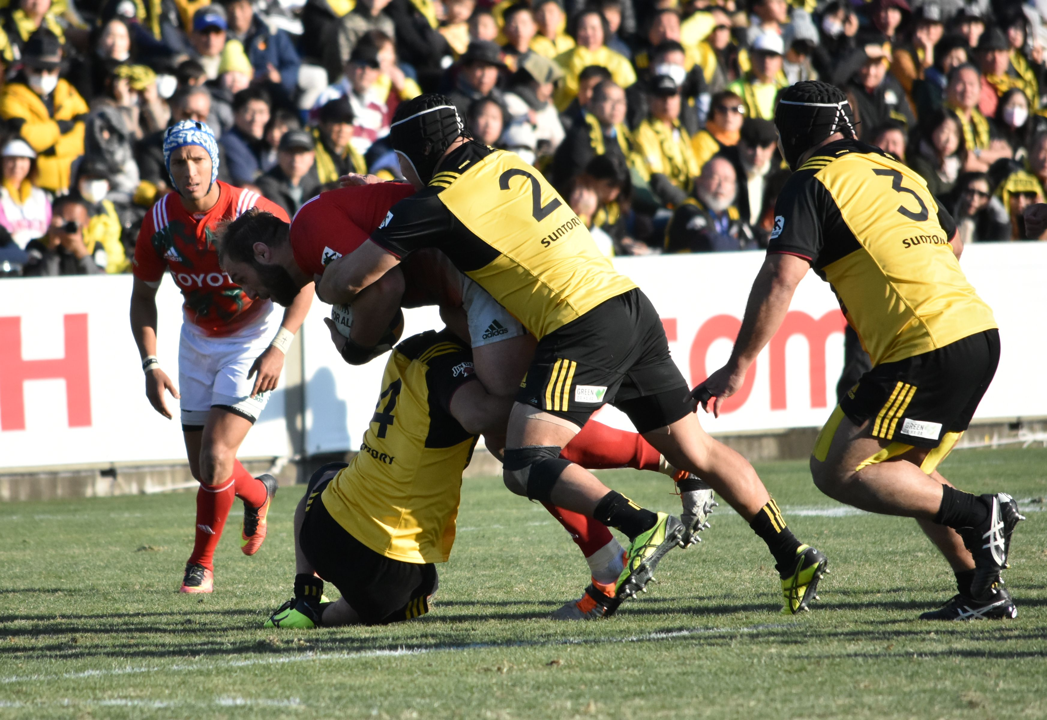 ジェイソン・ジェンキンス